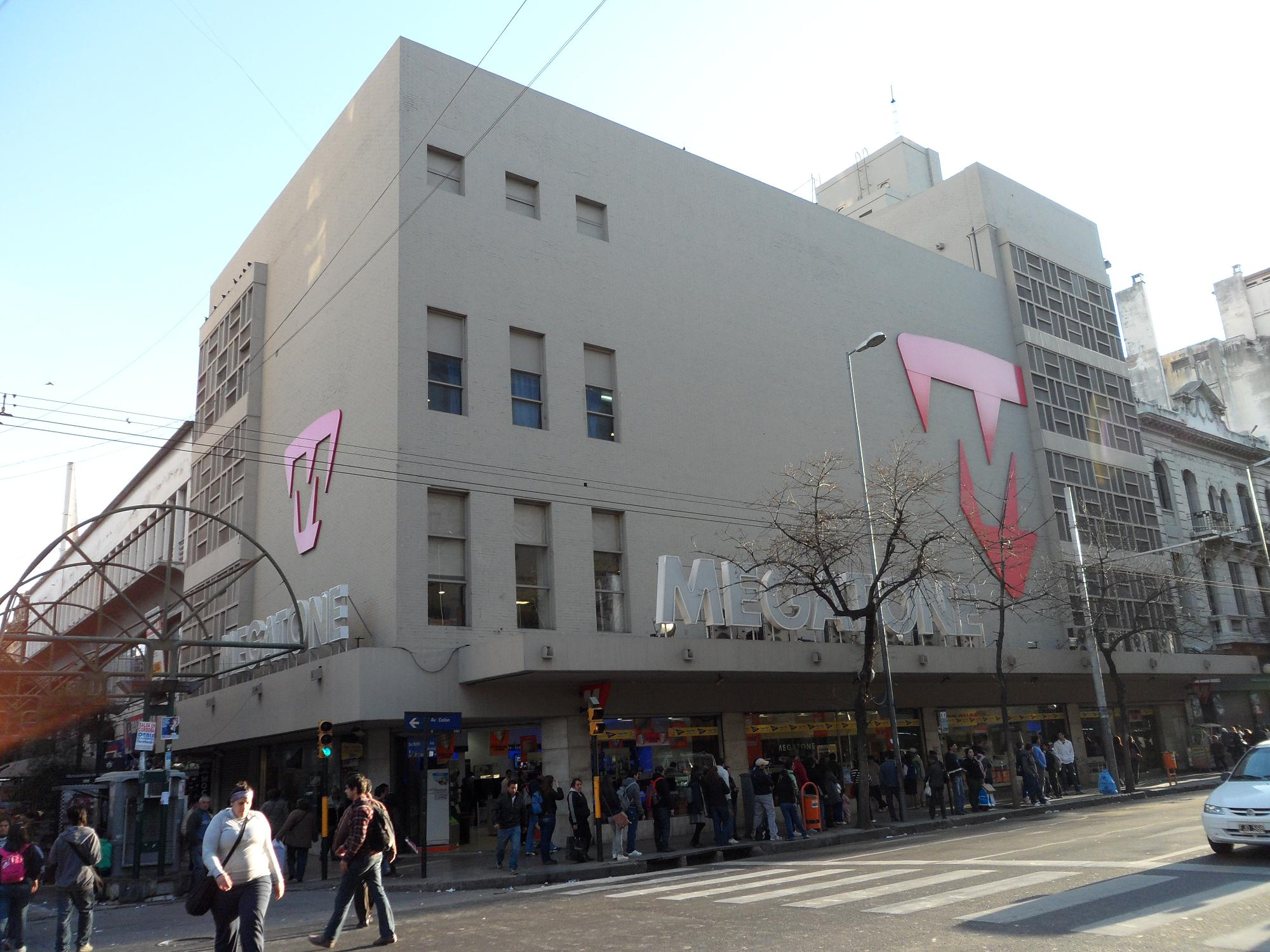 Sucursal Megatone Córdoba calle Colón esquina San Martín